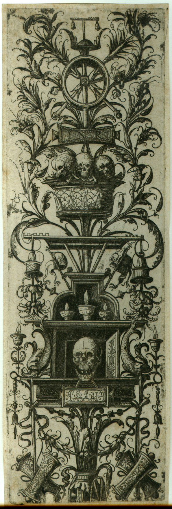 Hopfer, Hieronymus. Ornamentalfüllung mit Kamin (Design for a chimneypiece). Holl.79, iv/iv, with the Funck number 4 erased. “Eisenradierung/etching von H. Hopfer nach Zoan Andrea. In der Platte monogrammiert. Plattengröße 28.6 x 10 cm, mit 2 mm breitem Rändchen. (Minimale Altersspuren). Vorbesitz F. Koch, Mannheim (Lugt 1022a); Hermann Dürck (nicht bei Lugt); weiterer, nicht identifizierter Sammlerstempel. Hollstein 79, IV mit teils ausradierter Funck-Nummer ‘4’.”